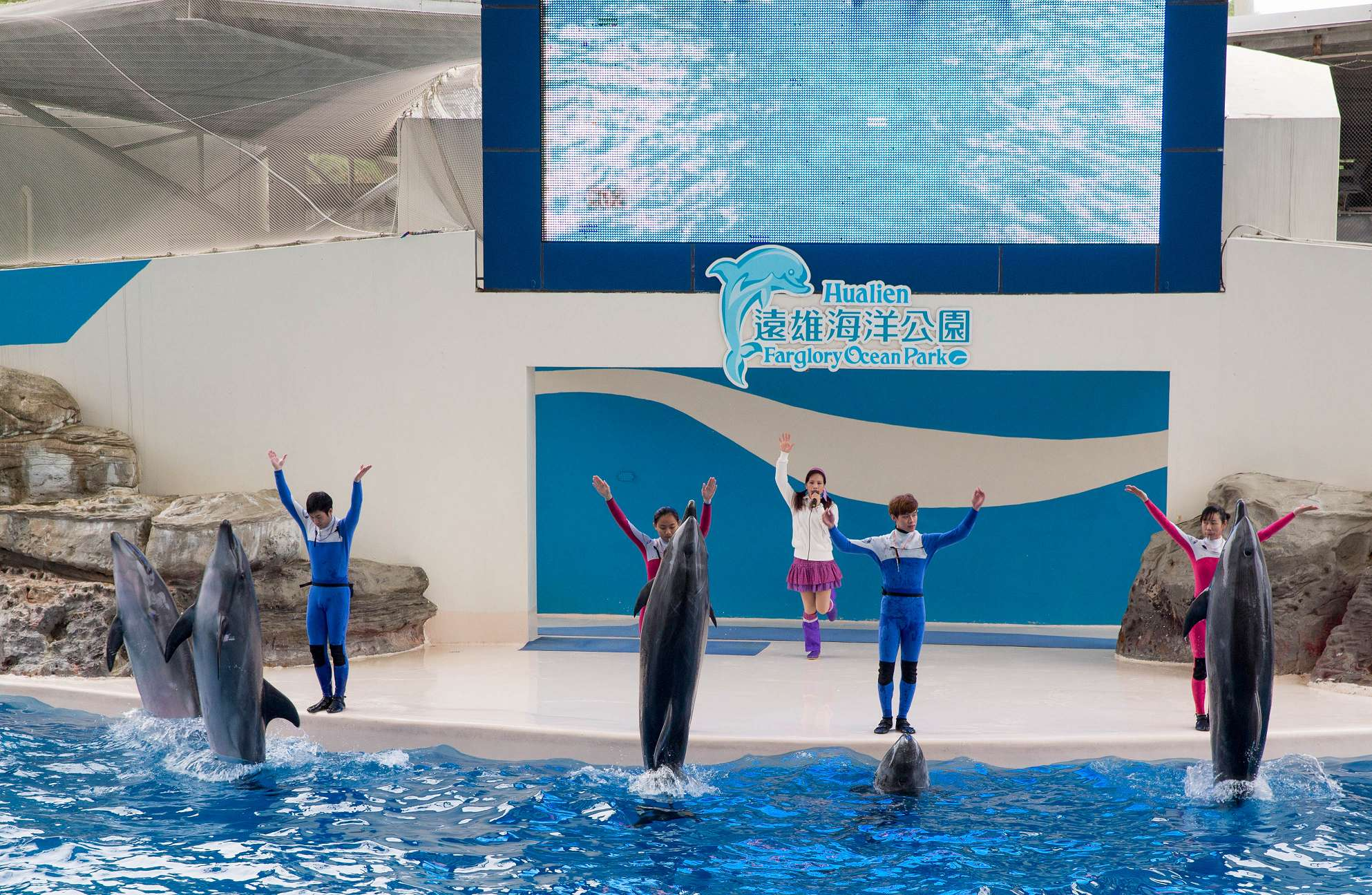 遠雄海洋公園海洋劇場海豚秀舞台。